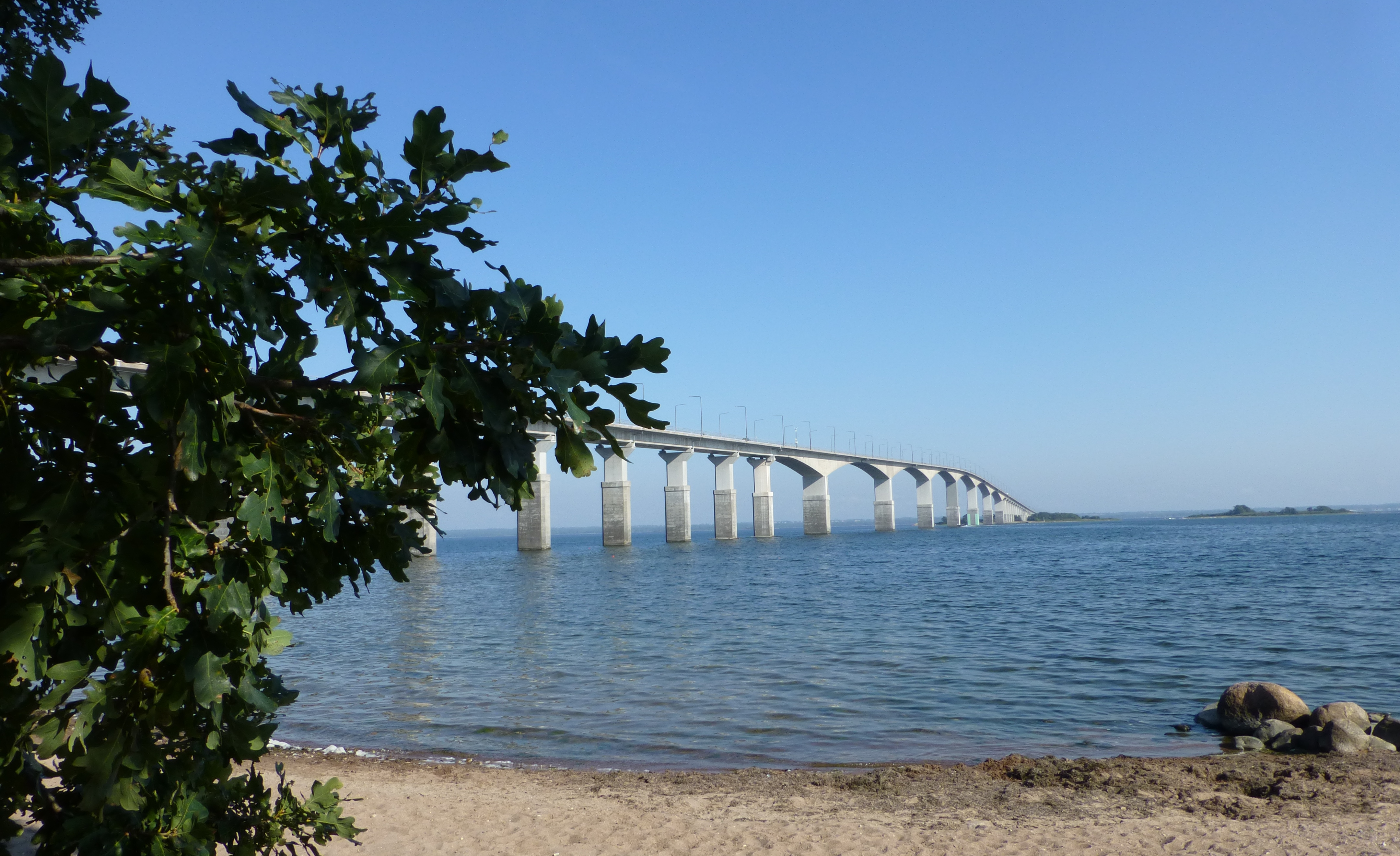 Ölandsbron